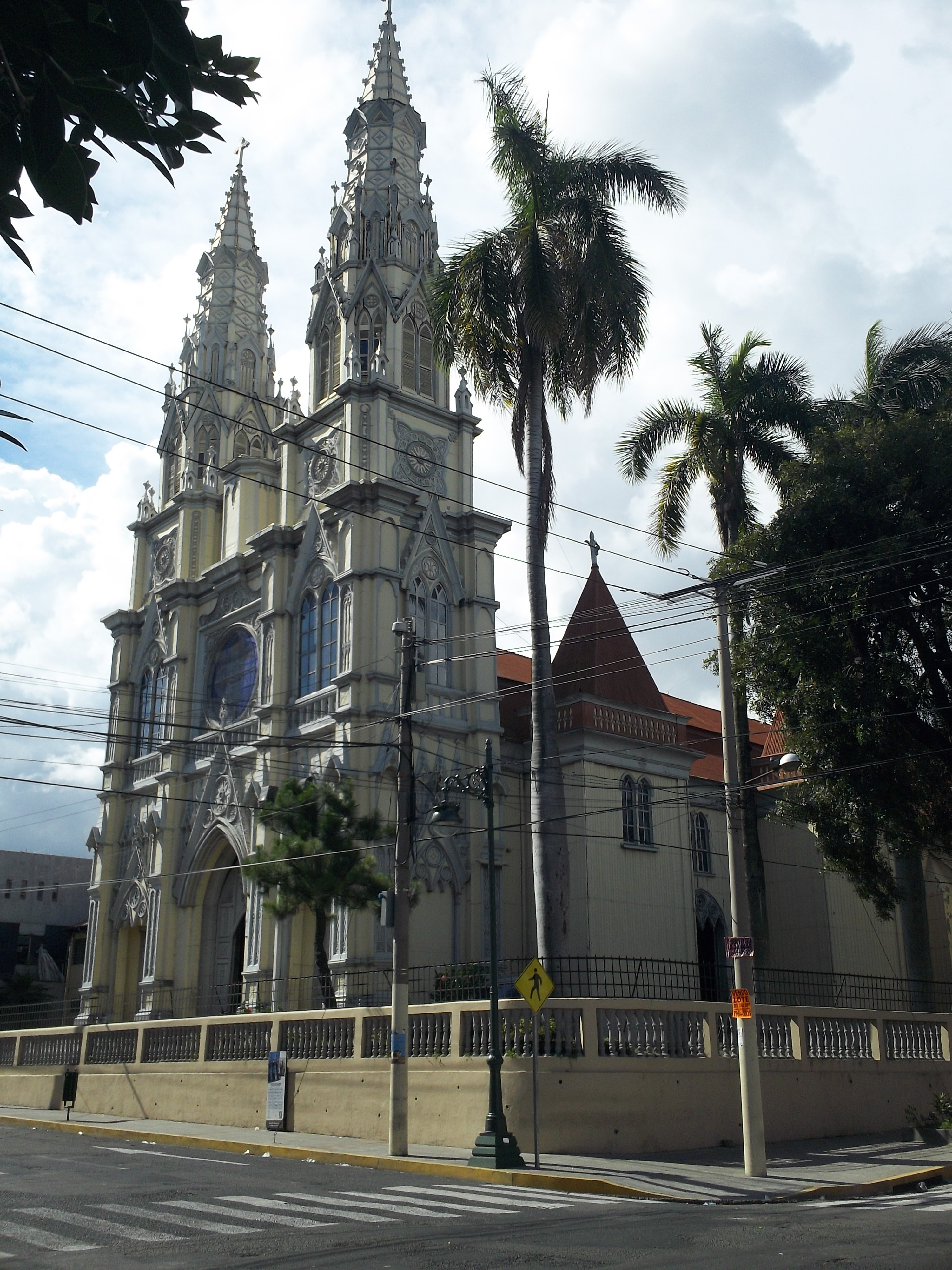 Iglesia reconocida por su bella estructura gótica